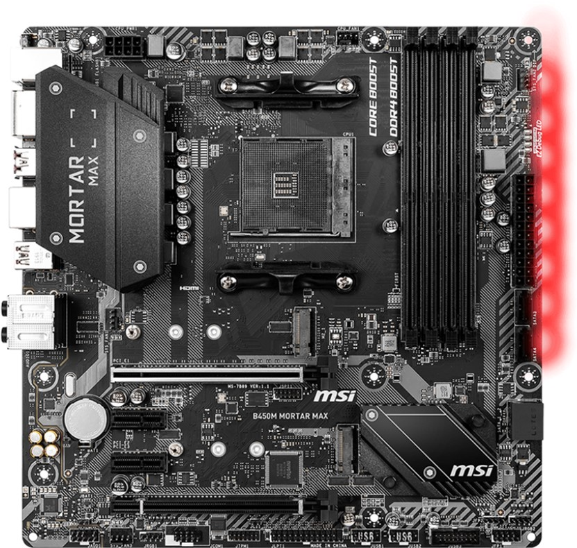 Материнская плата MSI B450M MORTAR MAX